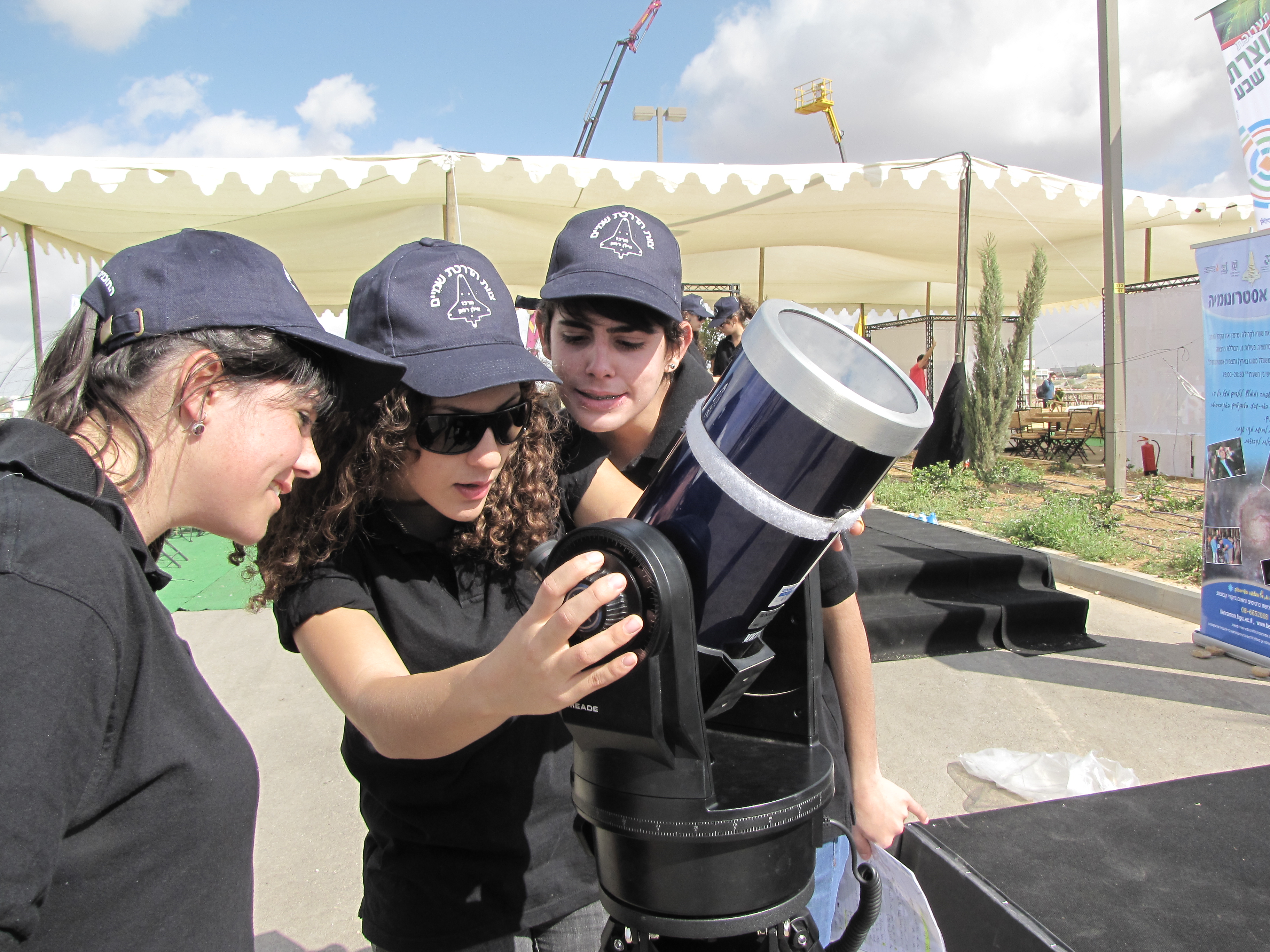 נוער מהתכנית למנהיגות מדעית של בית יציב